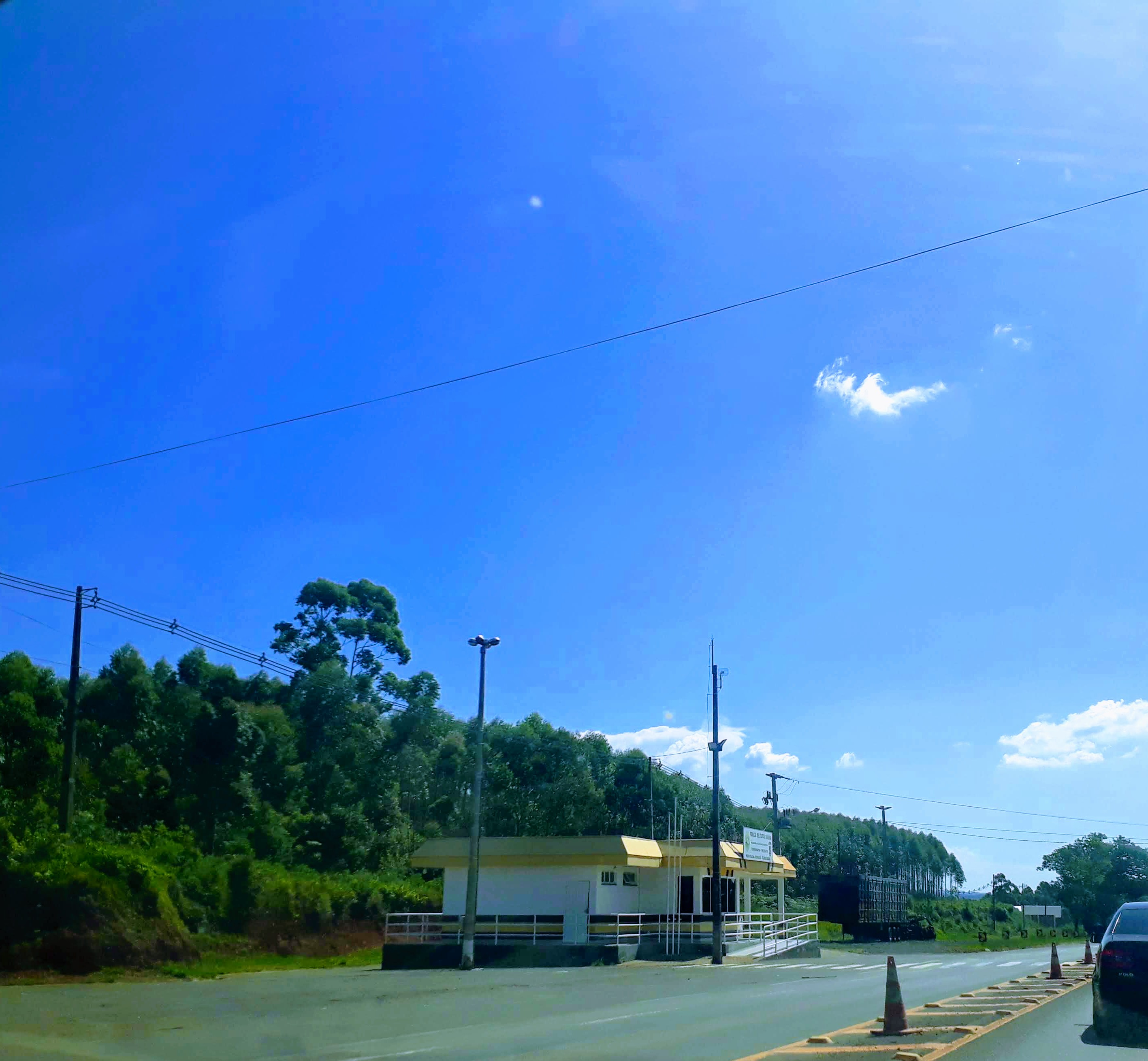 Posto Policial Rodoviário de Telêmaco Borba, Polícia Militar do Paraná. PR-160 (Rodovia do Papel) entre os municípios de Telêmaco Borba e Imbaú.